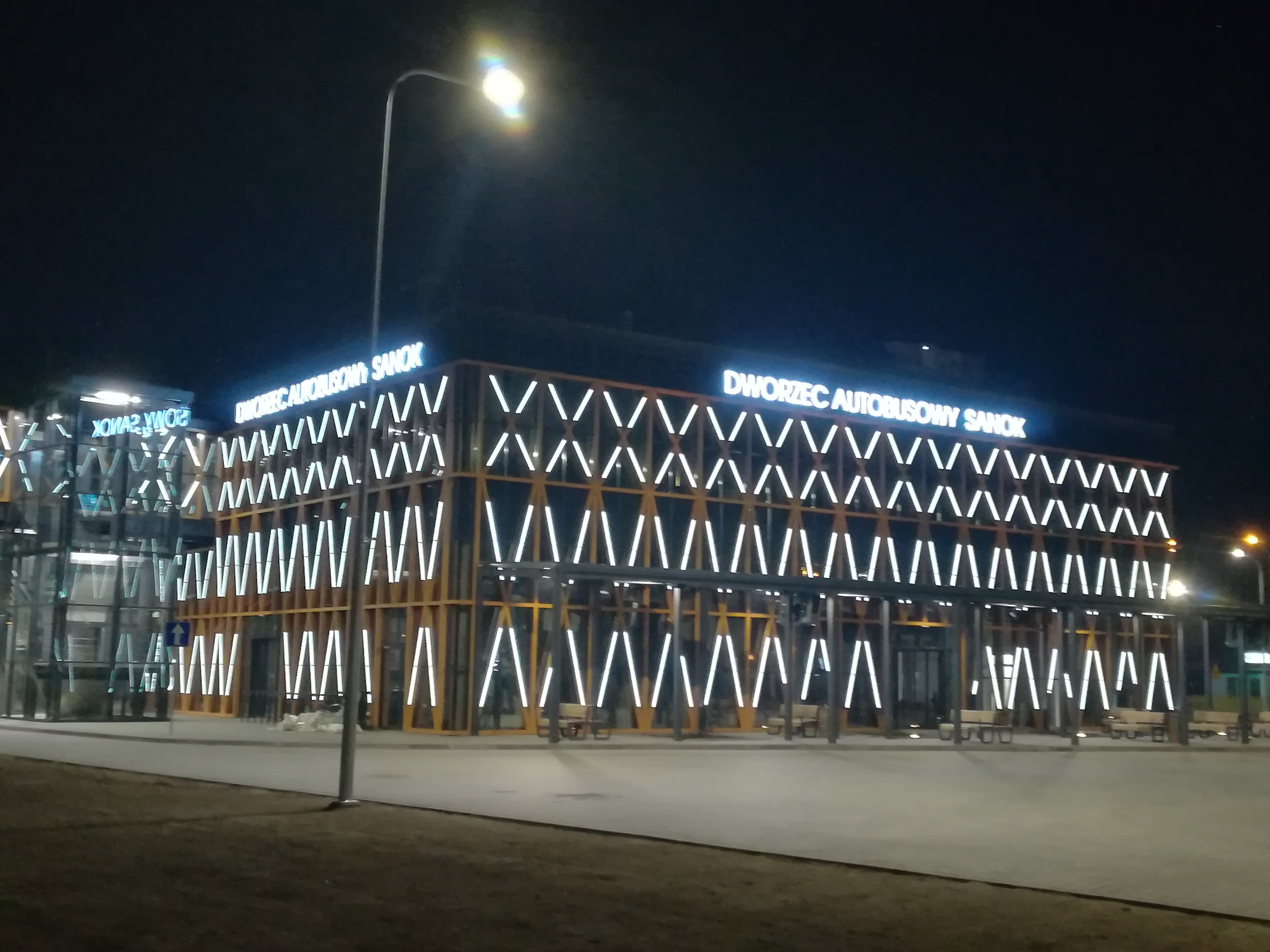 Dworzec autobusowy Sanok nocą